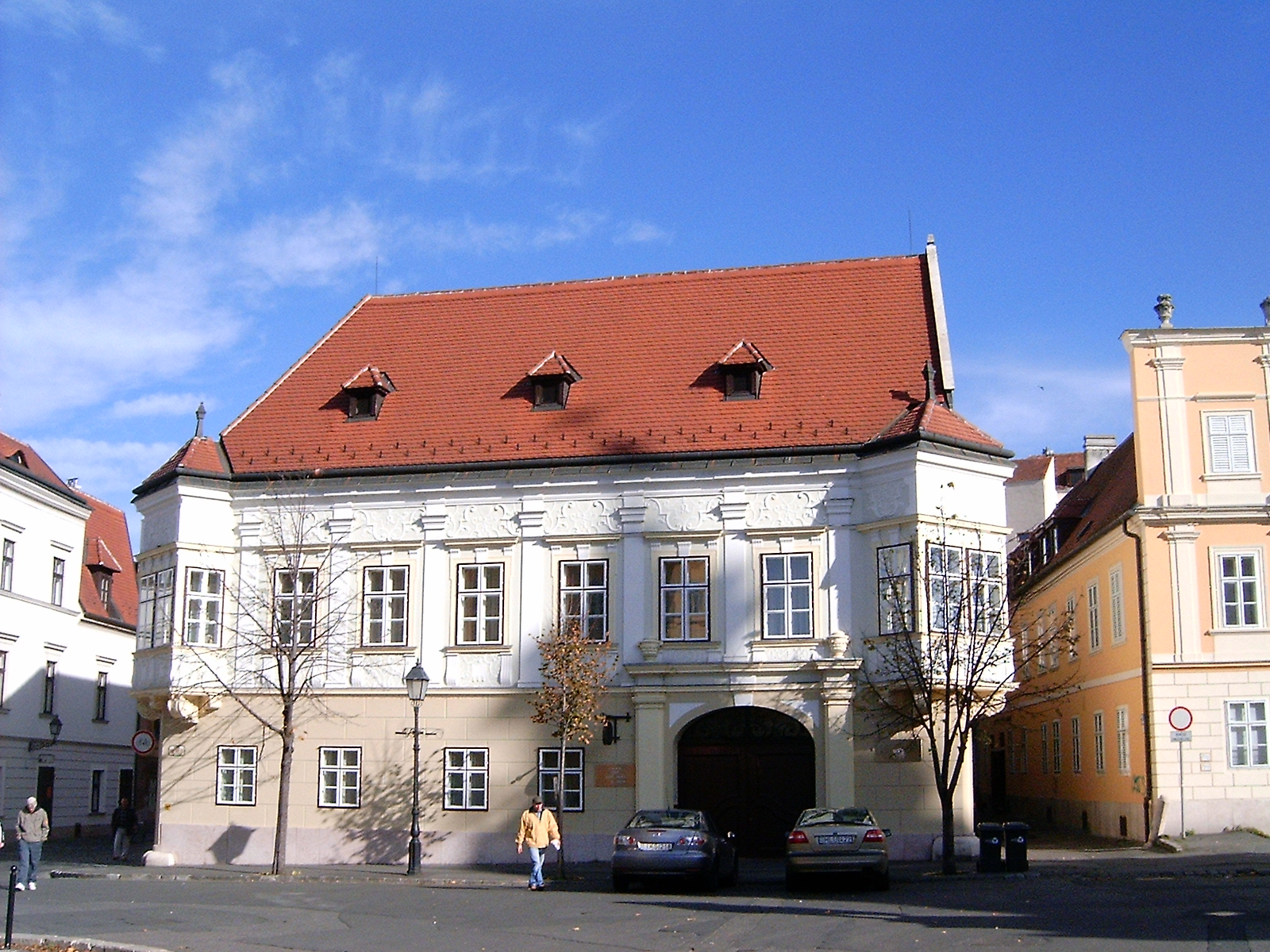 Altabák-ház a győri Bécsi kapu téren (Győr-Moson-Sopron megye)